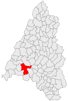 Categorie:Hărţi ale judeţului Bihor